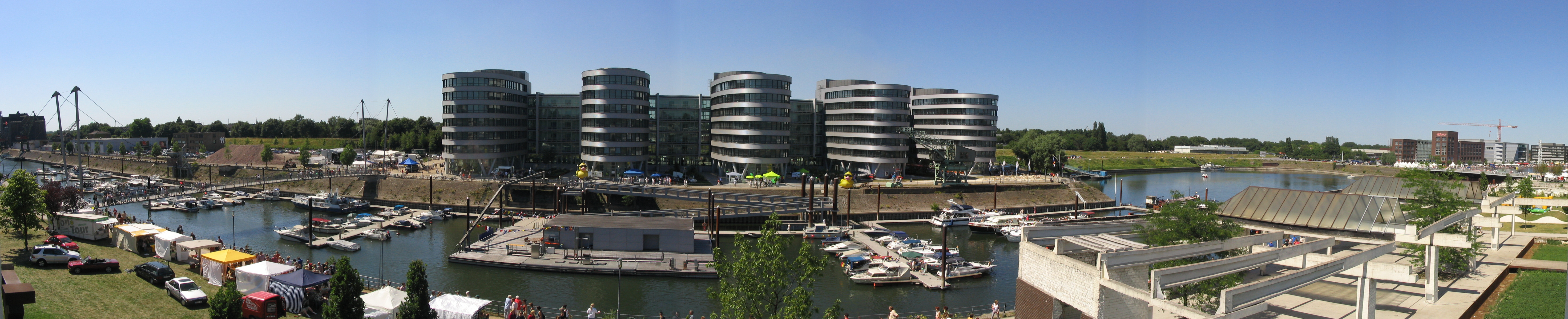 Duisburg Innenhafen (äußerer Bereich); Aufnahmestandort: Ludwigturm. In der Bildmitte die Five Boats, davor die Marina, links die Buckelbrücke, rechts der Holzhafen.